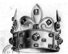 Couronne du Sacre du Trésor de Saint-Denys par Bernard de Montfaucon. XVIIIe siècle Papiers Montfaucon, Bibliothèque nationale de France, fr 15634, Pl 7